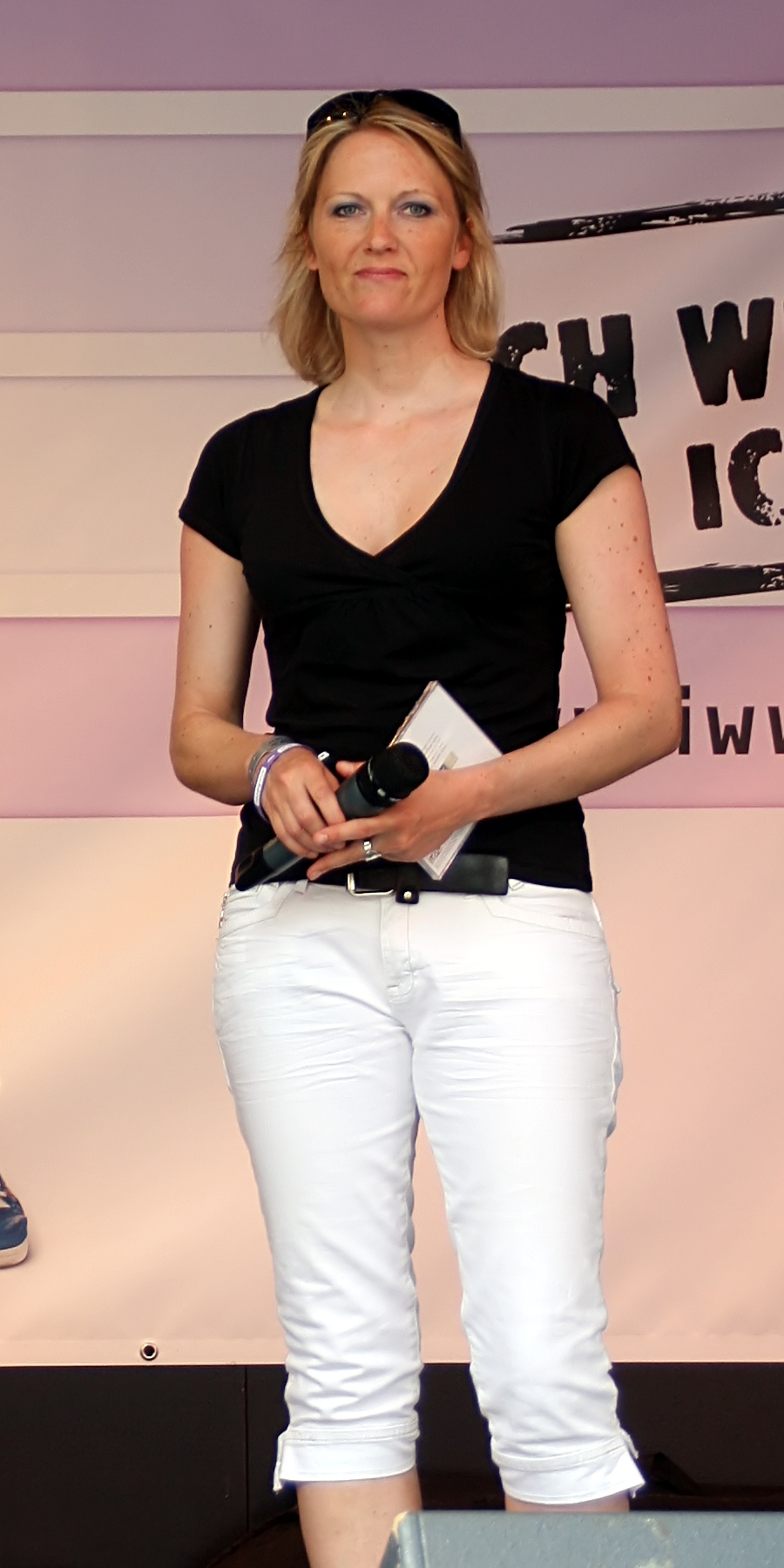 Meike Gottschalk als Moderatorin auf der Politur-Bühne „Politik trifft Kultur“ auf dem Alter Markt, Köln. Bühnenprogramm zum CSD-Straßenfest/ColognePride 2009.